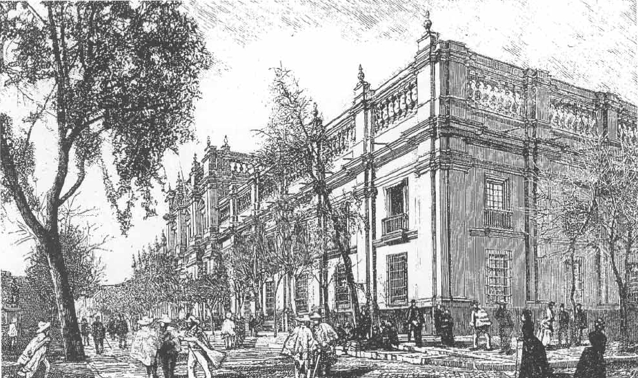 Palacio del Presidente Balmaceda y edificio del Tesoro, Santiago, Chile.